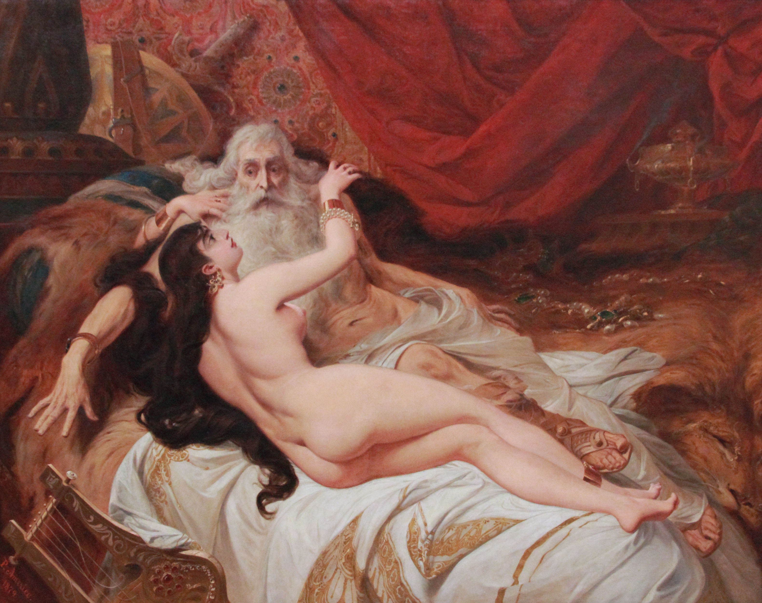 Pintura Davi e Abizag (1879) de Pedro Américo no Museu Nacional de Belas Artes.